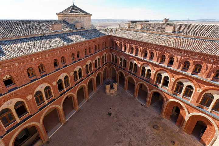 BIC: Castillo de Belmonte Located in: Belmonte (Cuenca) Coordenadas: 39°33′29″N 2°41′49″W